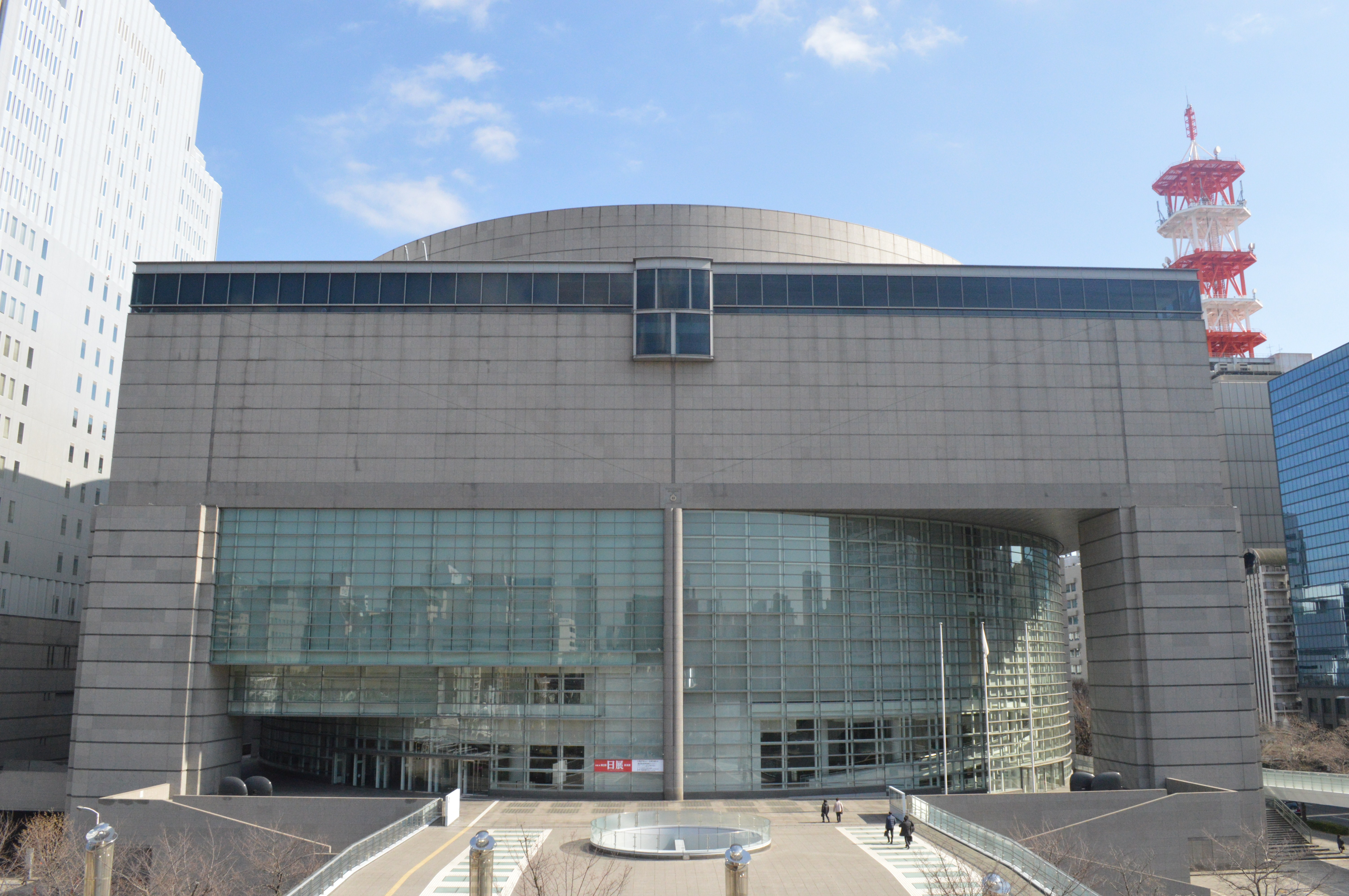 愛知県名古屋市にある愛知芸術文化センター。愛知県美術館や愛知県芸術劇場や愛知芸術文化センターアートライブラリーなどが入っている。